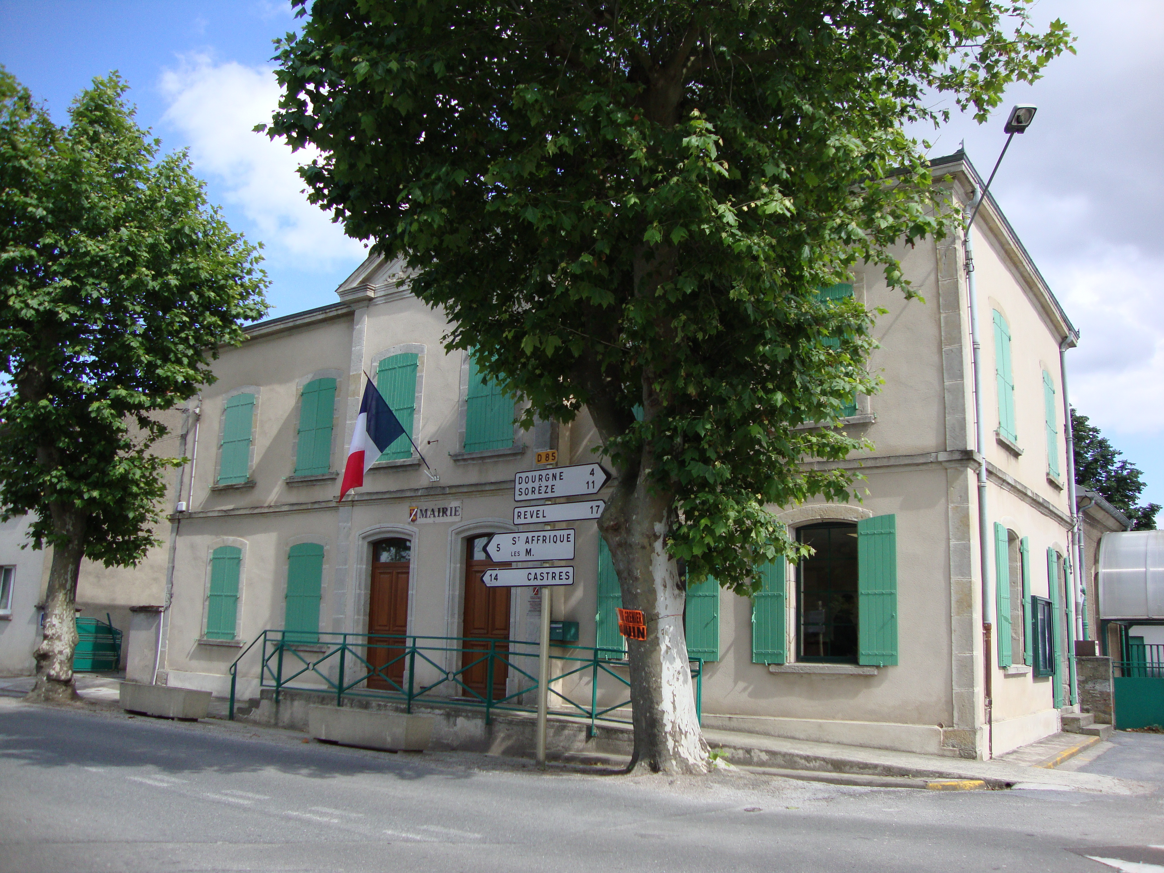 Verdalle (Tarn, Fr) mairie